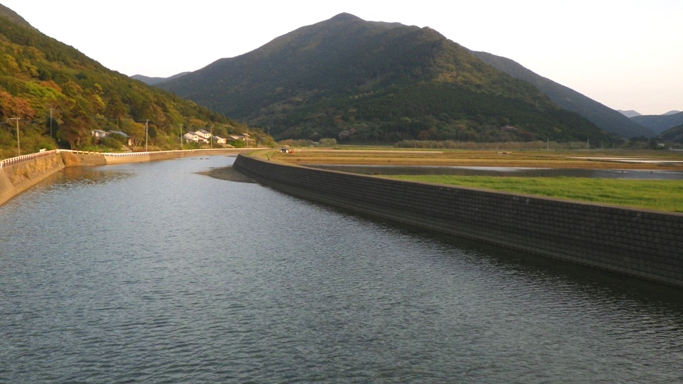 一ノ川河口。長崎県道162号・第二河務橋上より（長崎県五島市岐宿町河務）